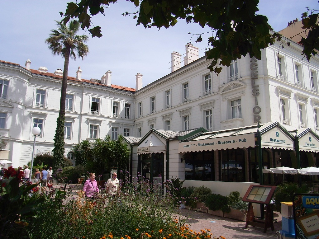 Hôtel Excelcior de Saint-Raphaël (83)